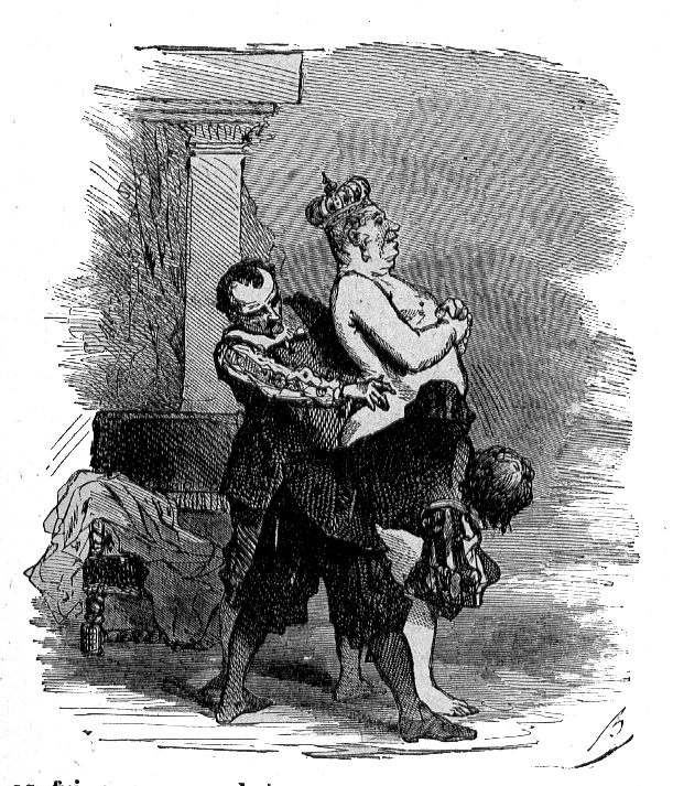 Pour la source voir : Discuter:Contes d'Andersen Vignette de Les Habits Neufs du Grand-Duc par Bertall représentant le Grand Duc et son nouvel habit...